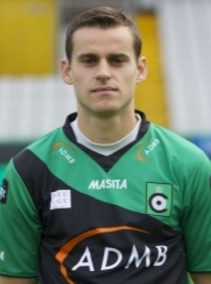 Karel Van Roose